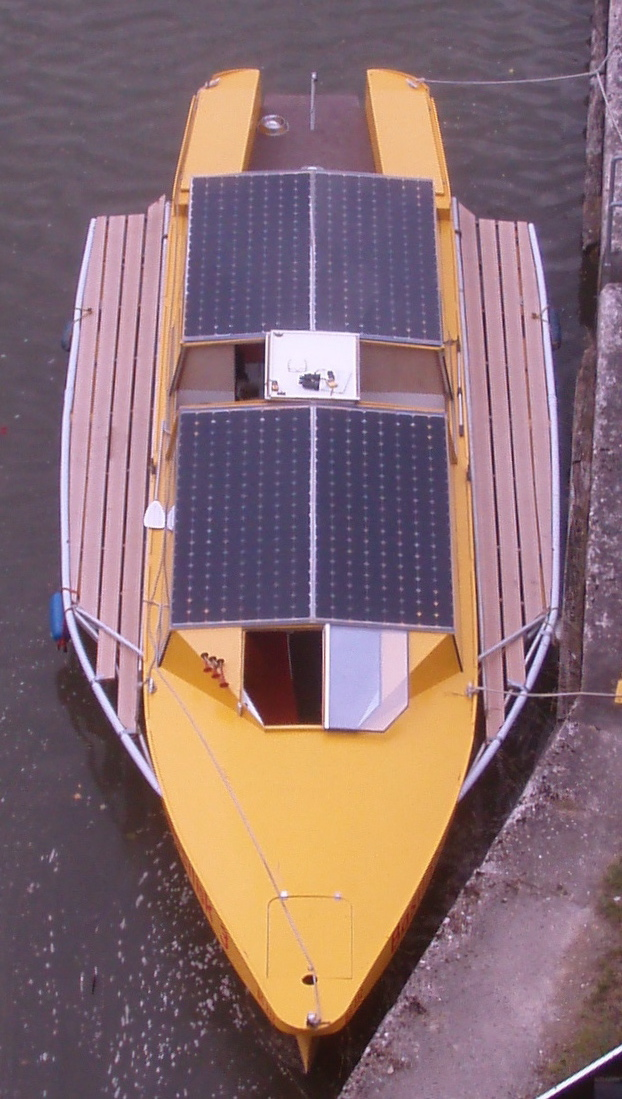 Rhein-Marne-Kanal